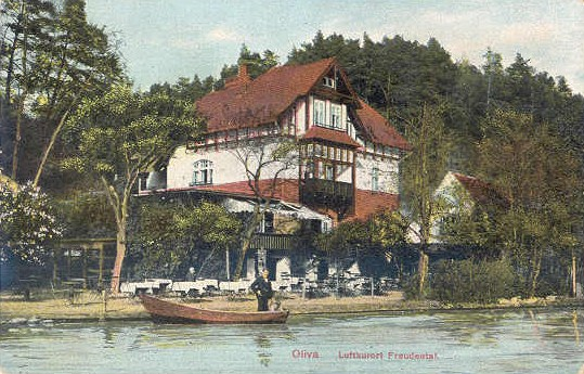 Dolina Radości - staw na Potoku Oliwskim i dom przy ul. Bytowskiej 5, Gdańsk-Oliwa.